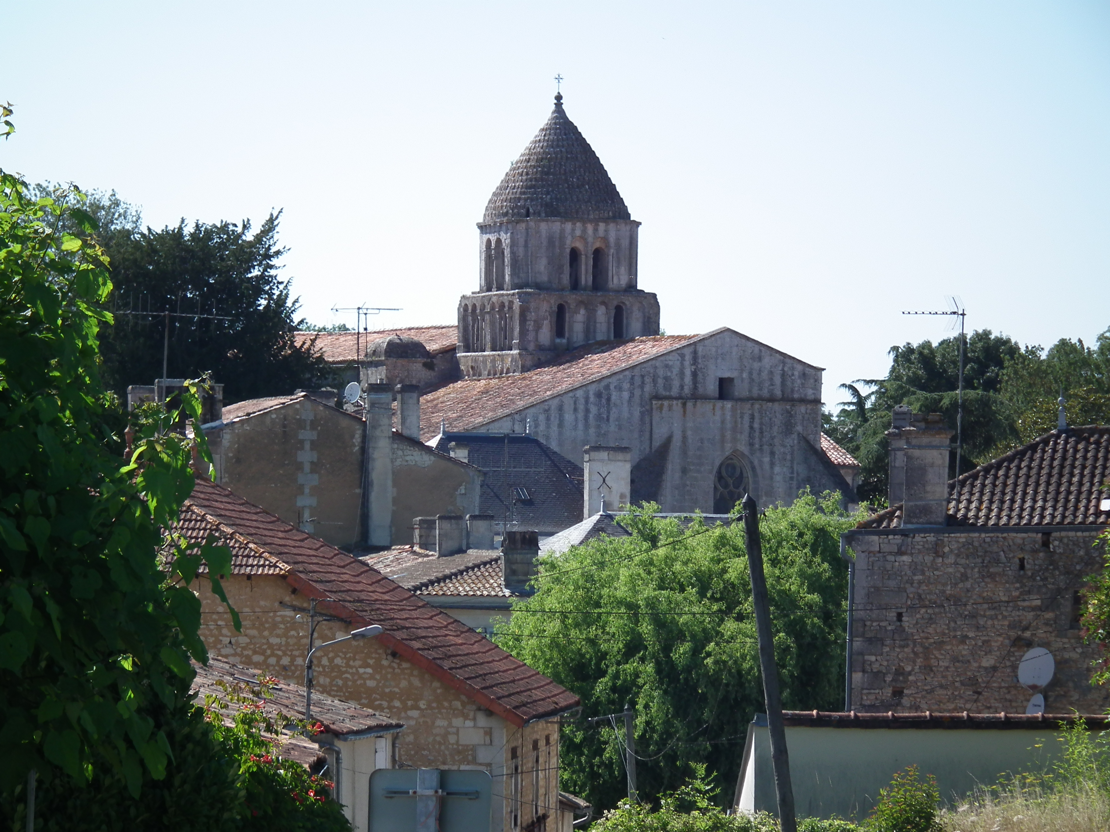 Le village de Nieul-le-Virouil